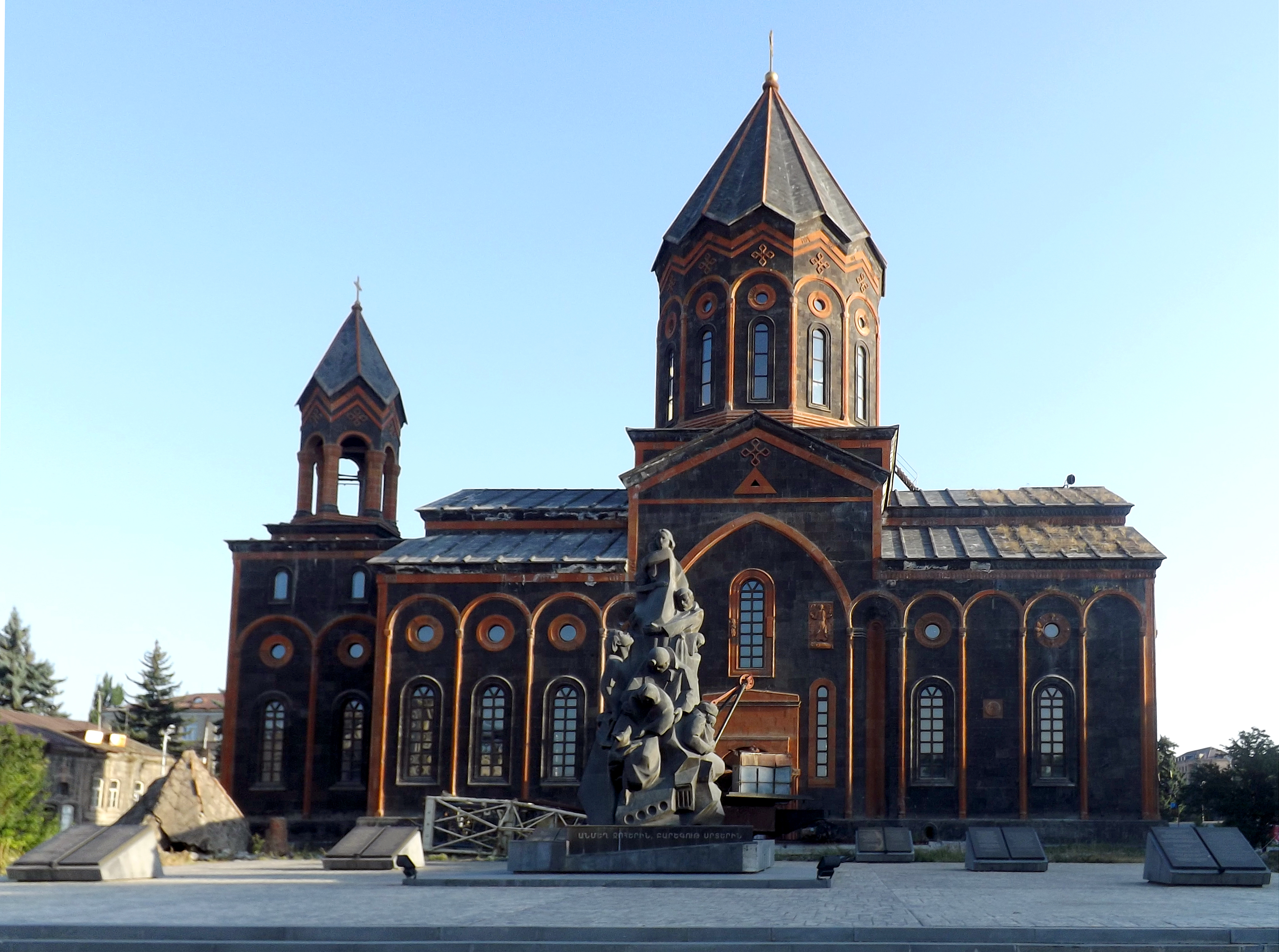 Եկեղեցի Ամենափրկիչ 1/4.869